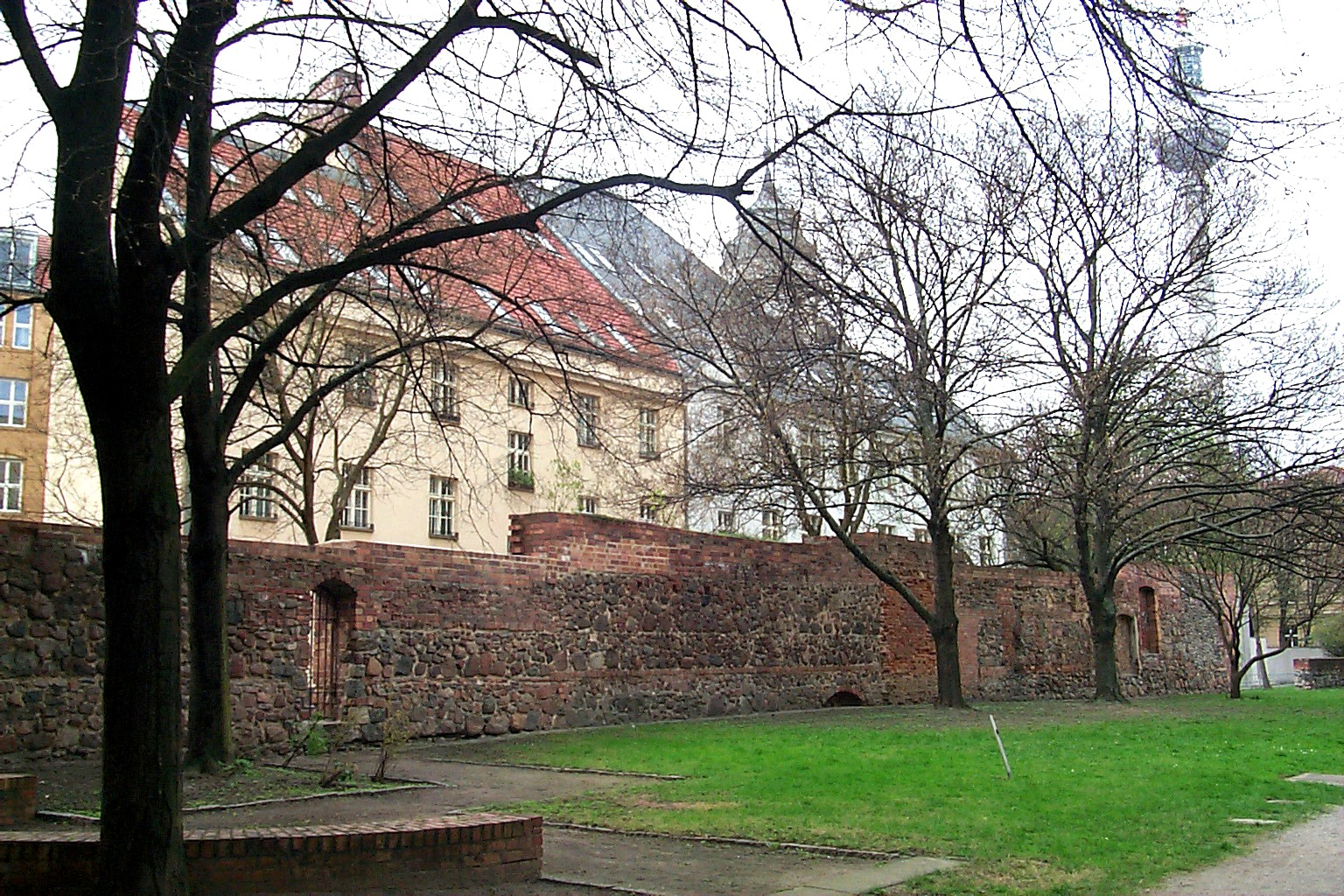 Rest der mittelalterlichen (Zoll-) Stadtmauer, noch 120 m lang, in der Waisen- bzw. Littenstraße, hinter dem "Alten Stadthaus" und der "Parochialkirche" gelegen. Sie ist die wohl wichtigste Zeugin der mittelalterlichen "Doppelstadt Berlin-Cölln".